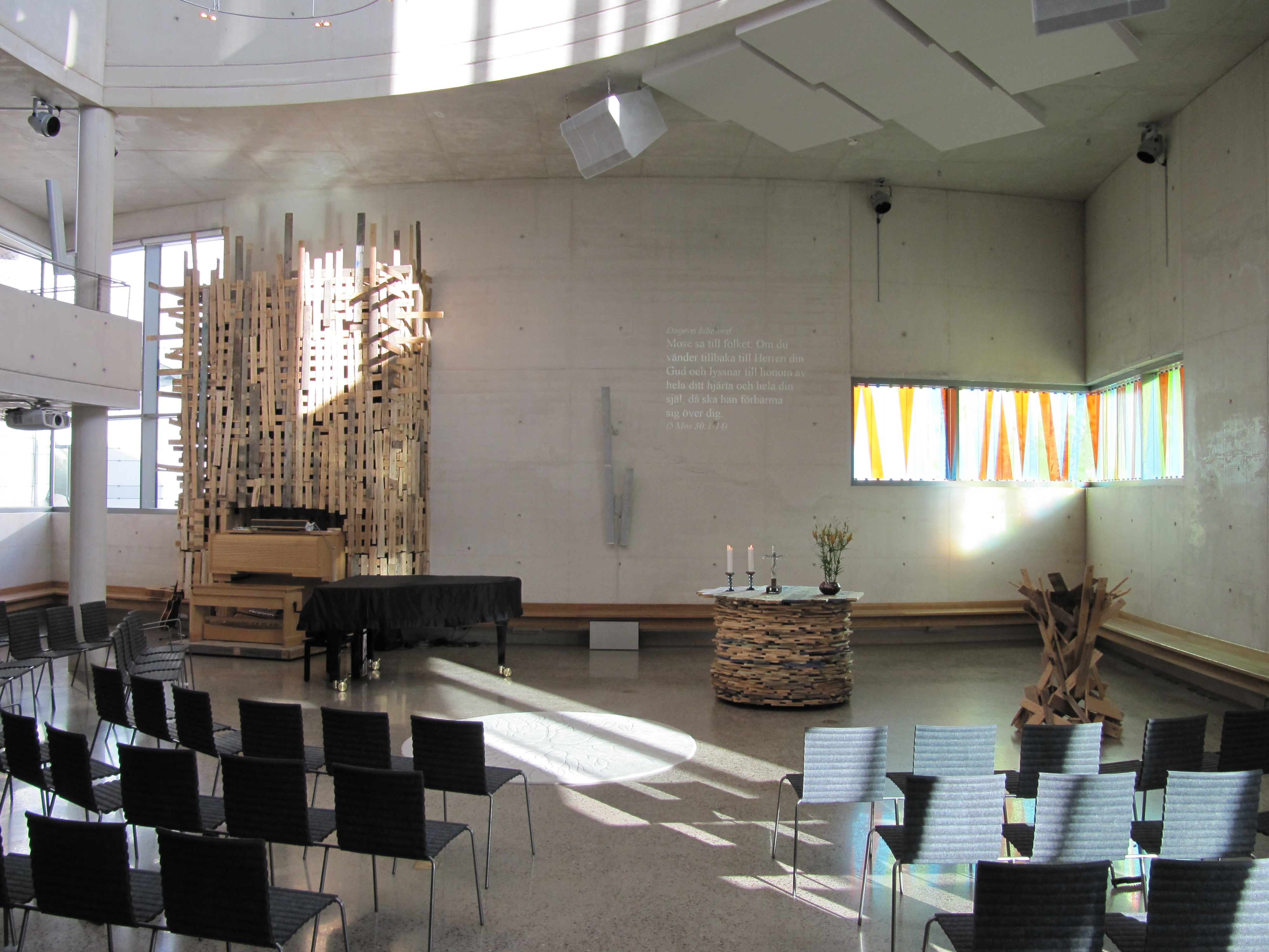 Kyrkorum i Turebergskyrkan